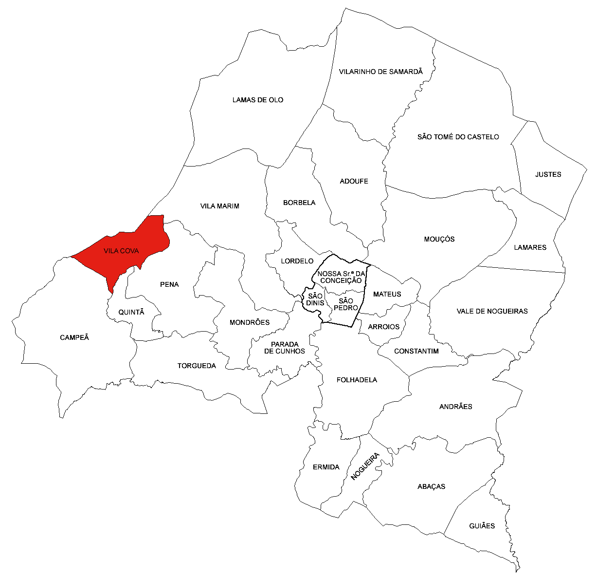 Freguesia de Vila Cova (concelho de Vila Real)